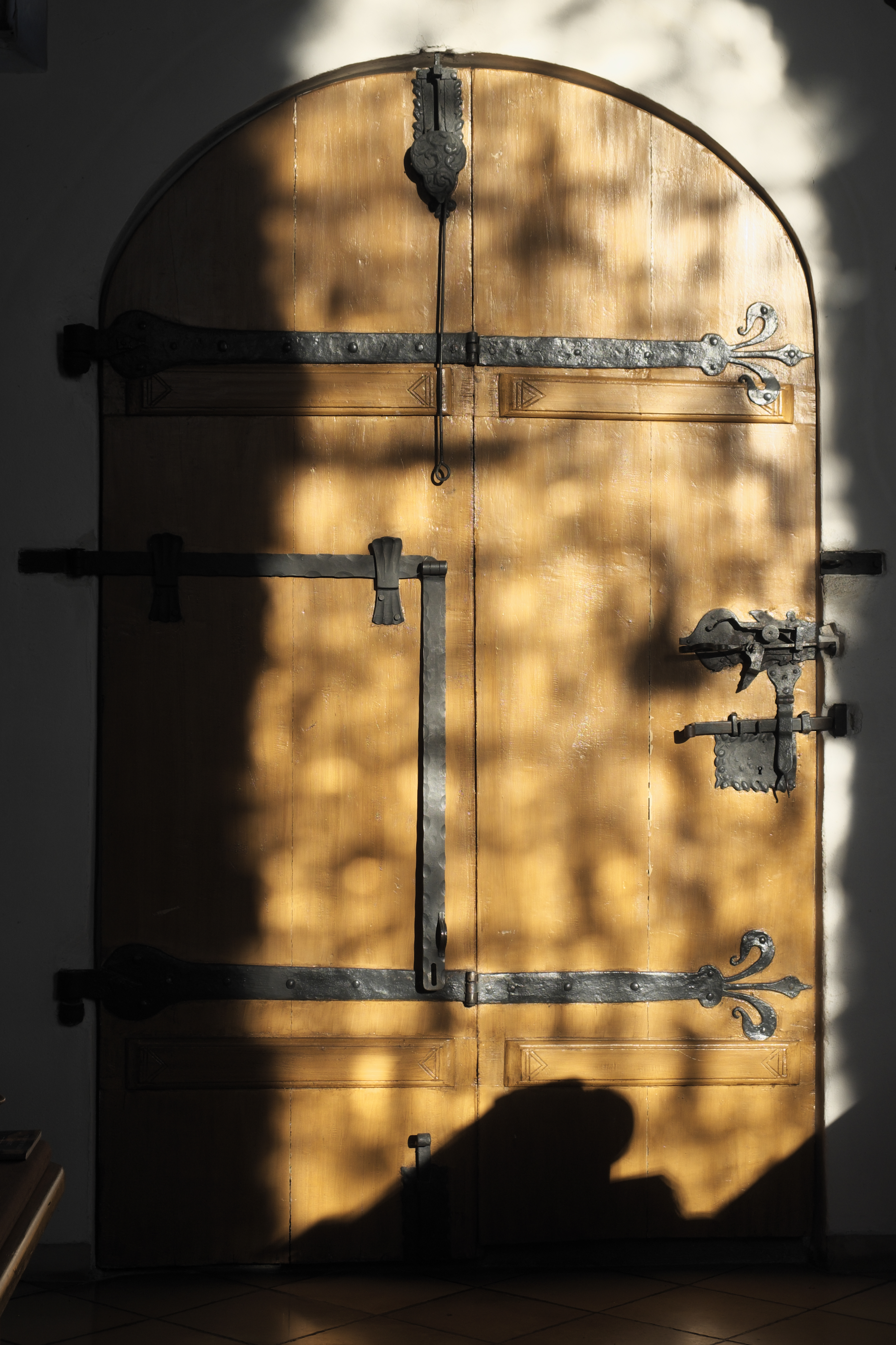 Katholische Pfarrkirche Zur Schmerzhaften Muttergottes in Unterfinning (Finning) im oberbayerischen Landkreis Landsberg am Lech (Bayern/Deutschland), Tür mit Kastenschloss